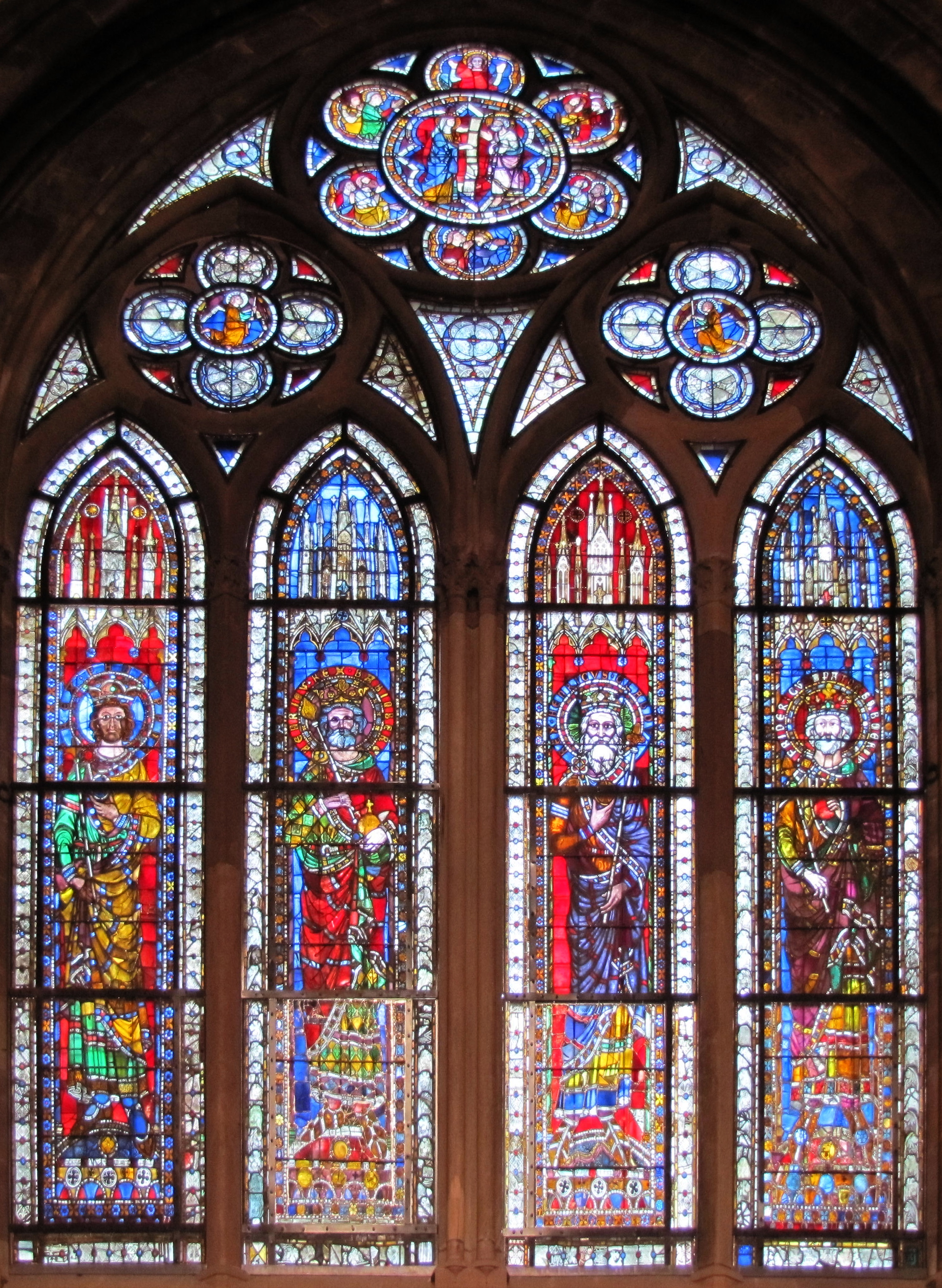 Alsace, Bas-Rhin, Cathédrale Notre-Dame de Strasbourg (PA00085015). Bas-côté nord, Verrières (1210-1270) "Empereurs Saint-Empire": Philippe de Souabe, Henri IV, Henri V, Frederic II